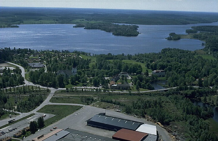 Motiv: Skinnskatteberg Nyckelord: Byggnadsminnen, Flygbilder, Riksintressen Kategori: Bruksmiljö.